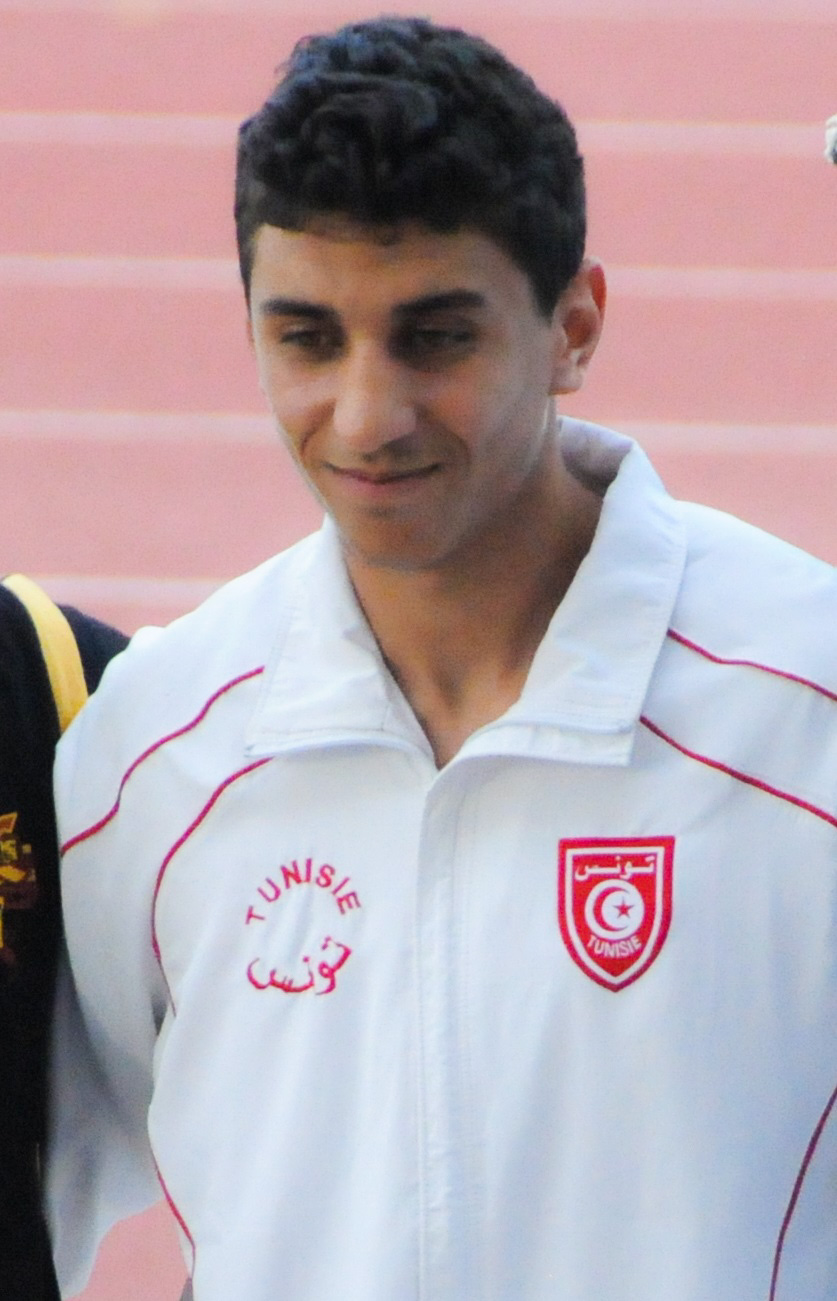 Mohamed Romdhana sur le podium du 1er meeting d'Athlétisme (CAA) international de Tunis en juin 2012